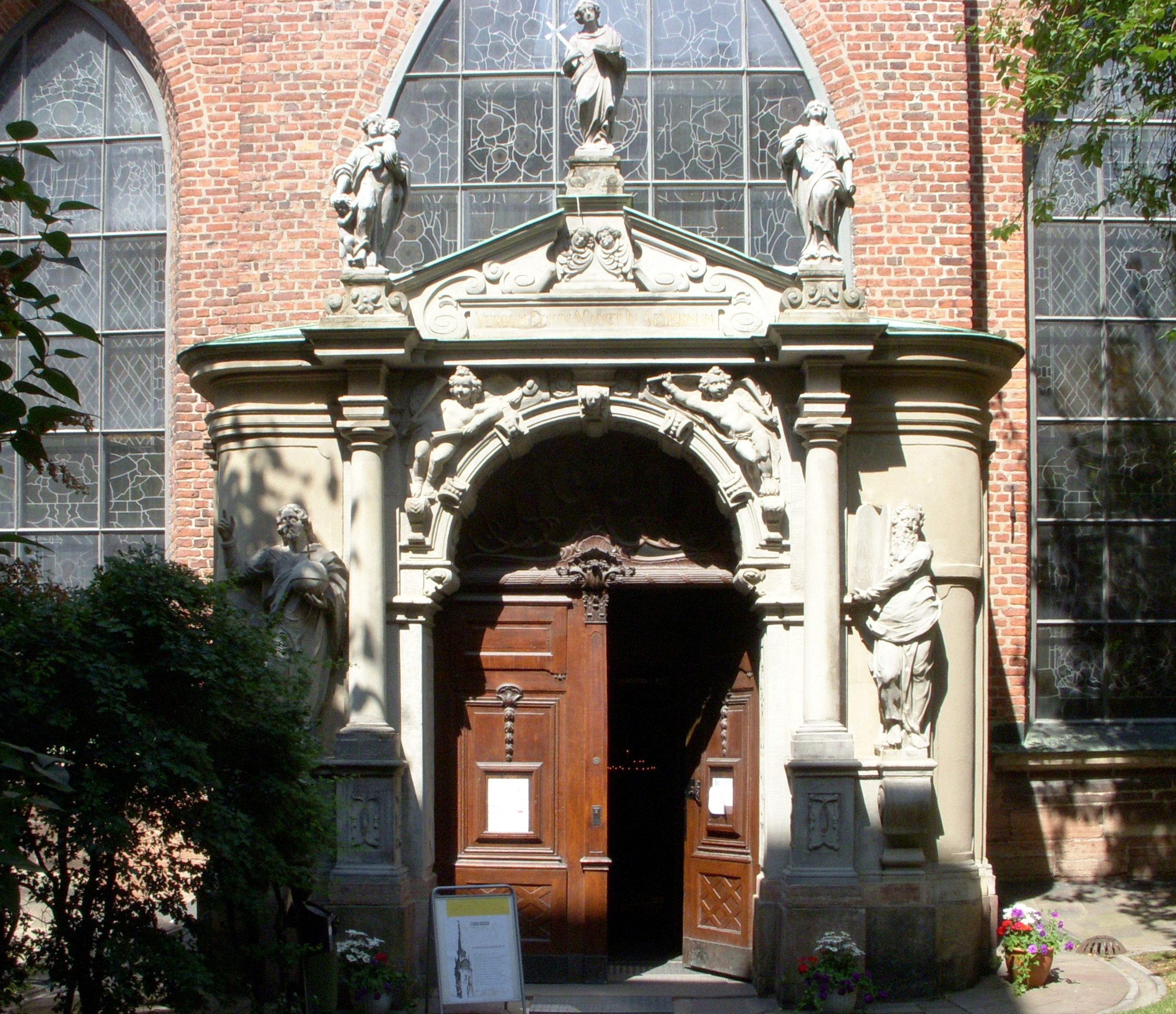 Tyska kyrkan, Stockholm, portal mot sydost